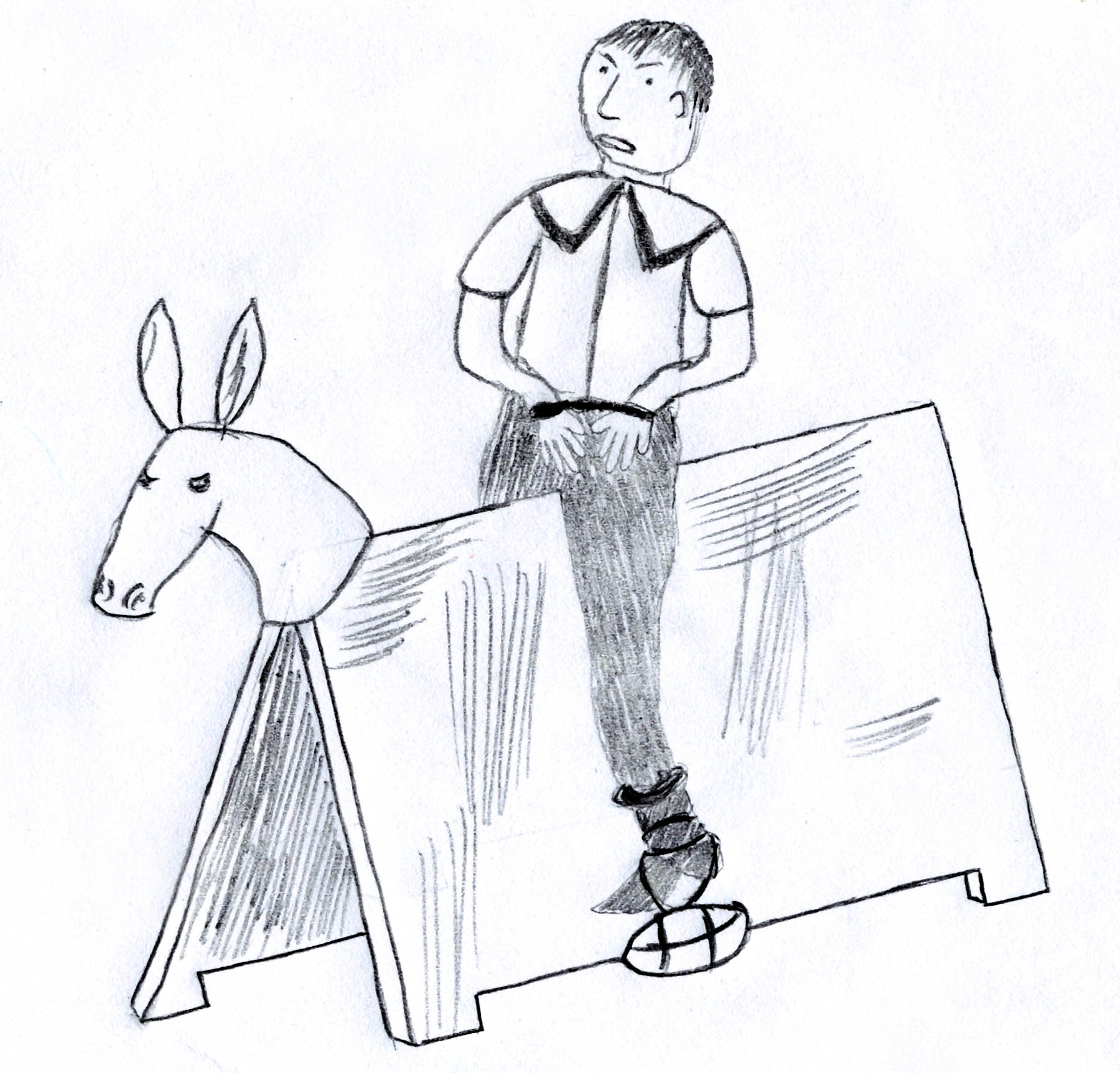 Zeichnung eines mittelalterlichen Strefesels, der zur öffentlichen Bestrafung von Bürgern eingesetzt wurde. Frei nach einer Skizze von Heinz Soell.